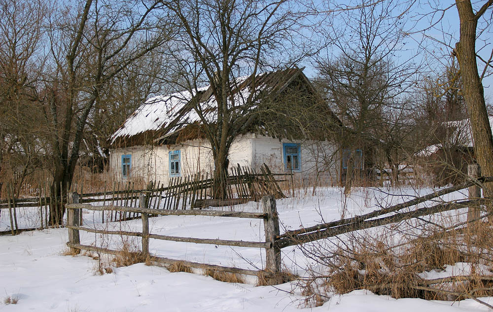 Господарство